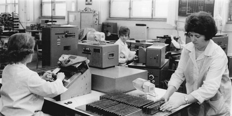 Zentralbild-Reiche-21.4.71-ku-Berlin: Neuerererfolge im VEB Werk für Fernsehelektronik. Acht Neuerer des Werkes arbeiteten seit Januar außerhalb ihrer Arbeitszeit an einem Automaten. Jetzt ist er in der Abteilung Montage der Germanium-Spitzendioden (vorn links) im Einsatz. Es ist ein 50fach-Bewerter-Automat für Germanium-Spitzendioden unmittelbar nach dem Einschmelzen. Die Qualität der Dioden wird mit diesem Gerät unmittelbar nach der Montage erfaßt und ausgewertet - der Ausschuß kann dadurch noch vor der weiteren Bearbeitung aussortiert werden. Die Brigade "Rosa Thälmann" in dieser Abteilung kämpft um den Staatstitel "Kollektiv der soz. Arbeit" und um den Ehrentitel "Werkteil der DSF"."